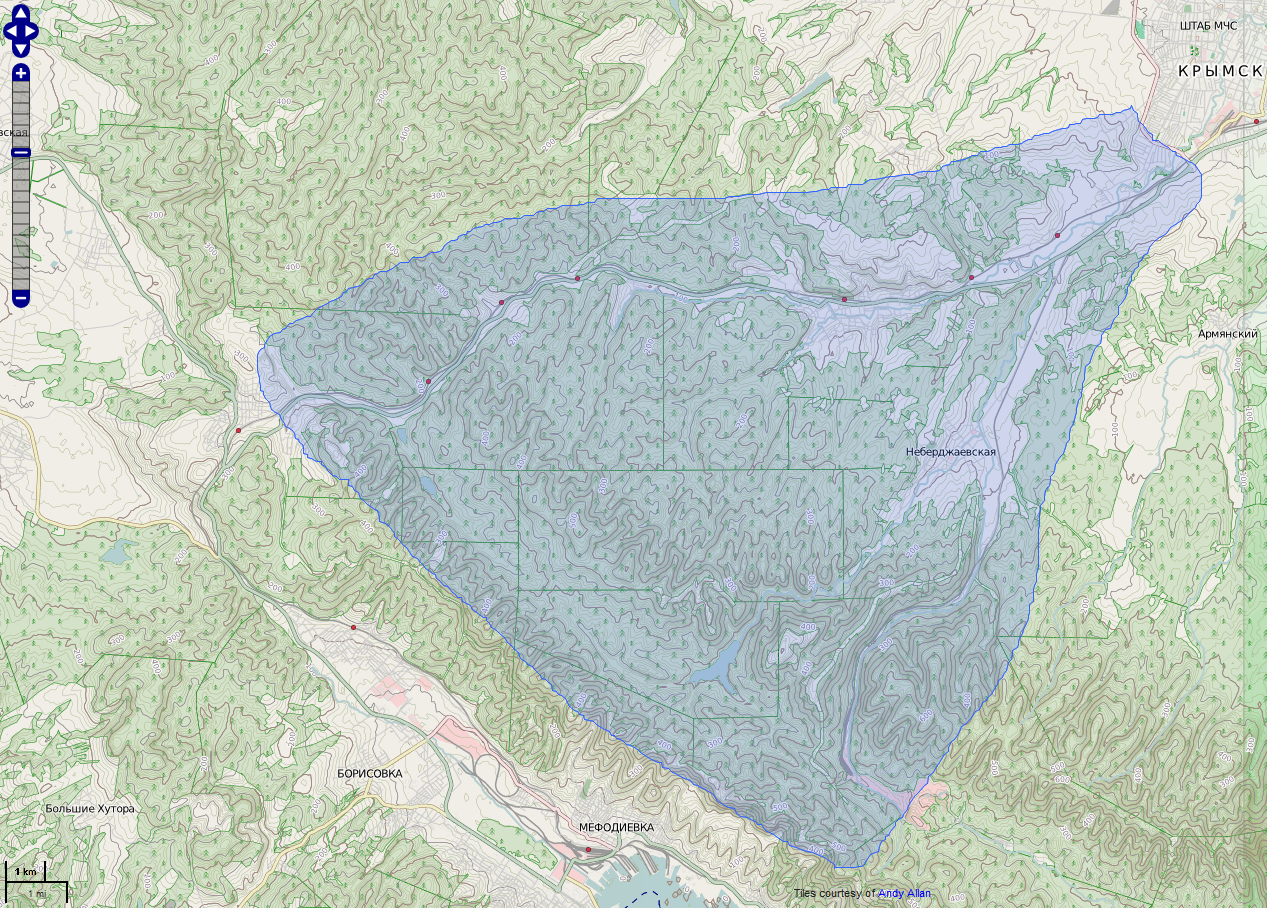 Бассейн рек Баканка, Неберджай и Богаго, а также части реки Адагум по течению выше города Крымска